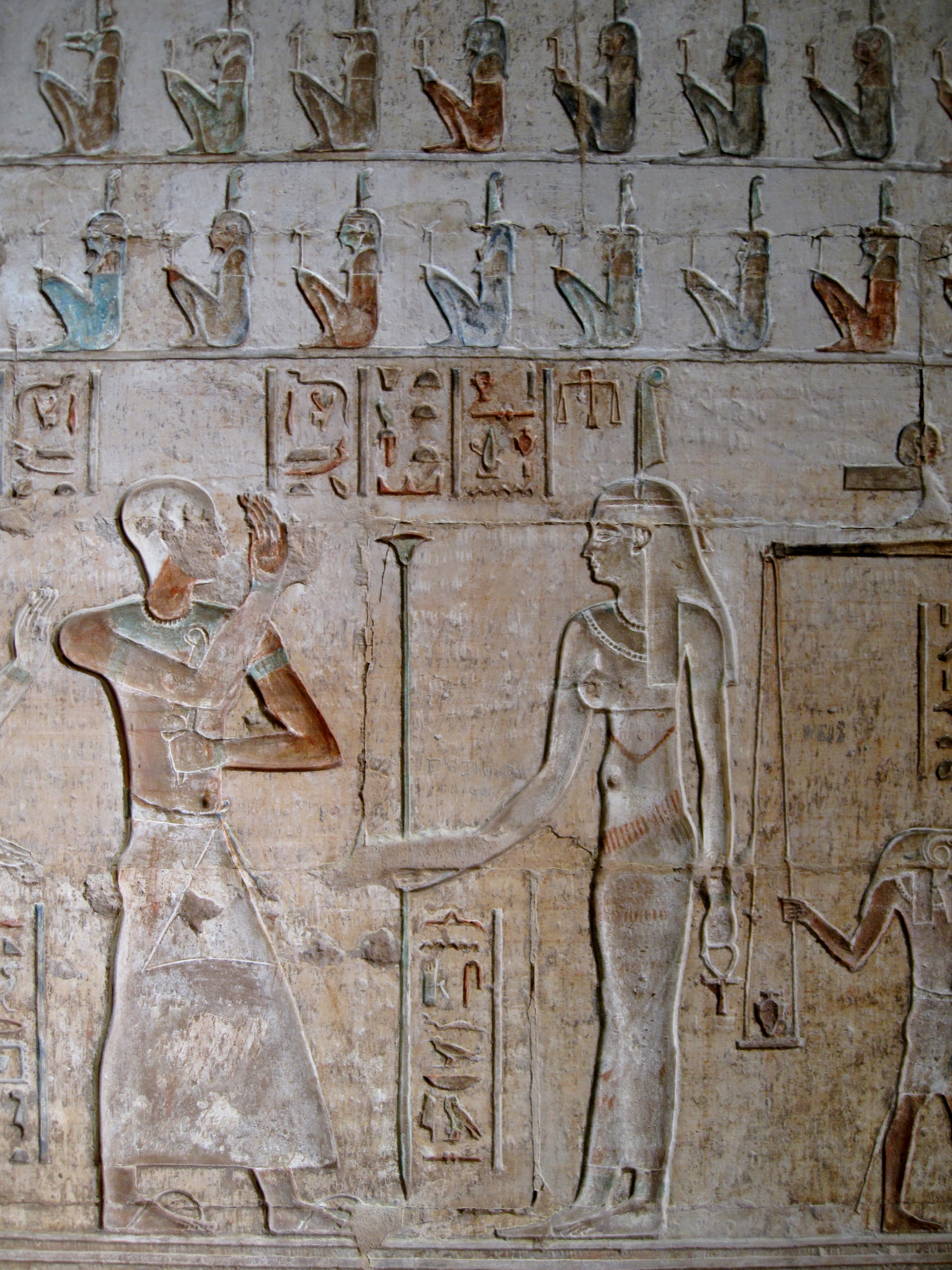 Relief im Innenraum des Hathor-Tempels von Deir el-Medina („Kloster der Stadt“), altägyptisch Set Maat („Platz der Wahrheit“), in Theben-West bei Luxor, Ägypten